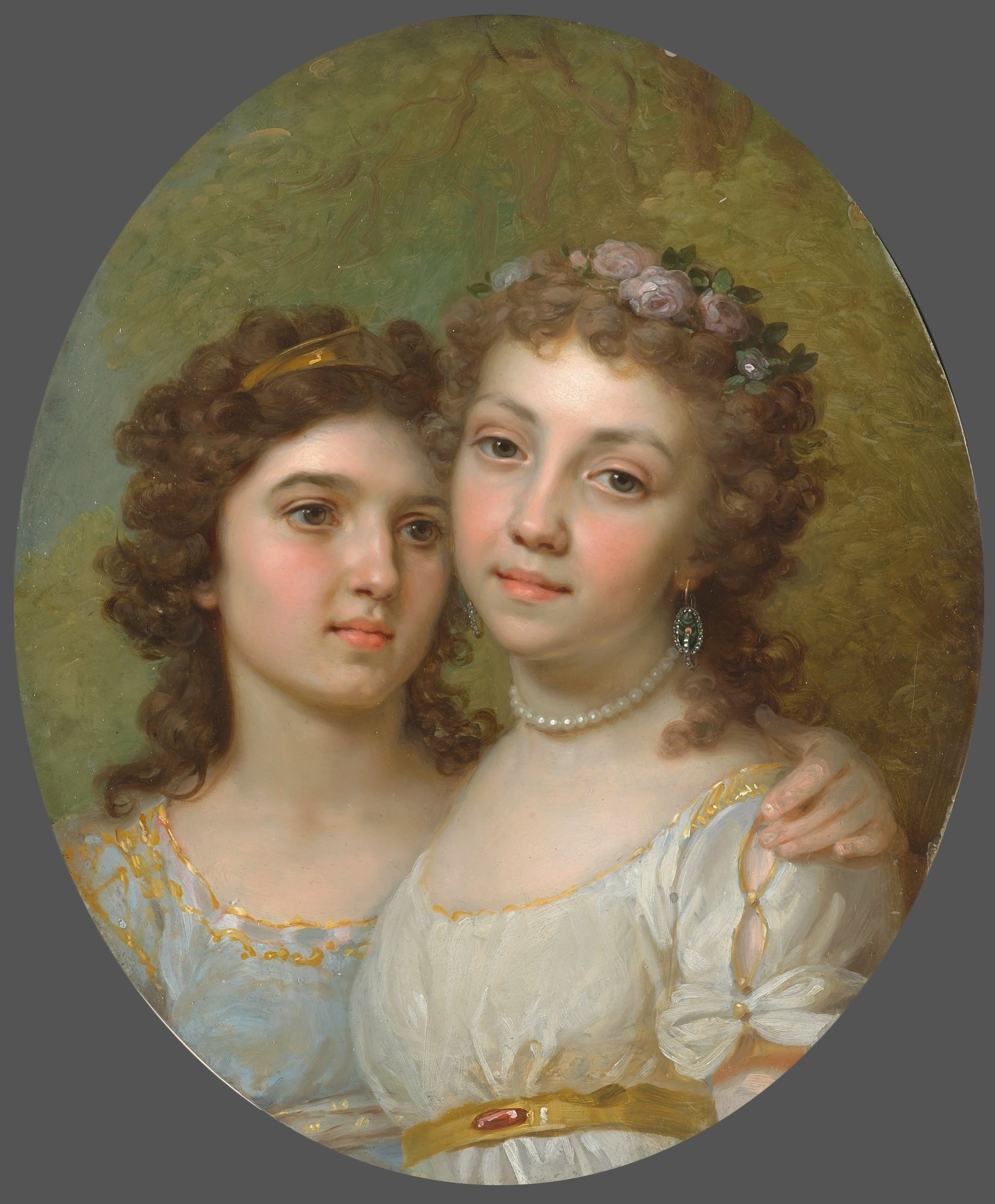 Лиза и Даша, две горничные девушки Н. А. Львова